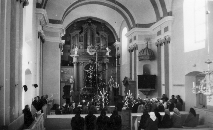 Kirche innen Weihnachten 1979 01